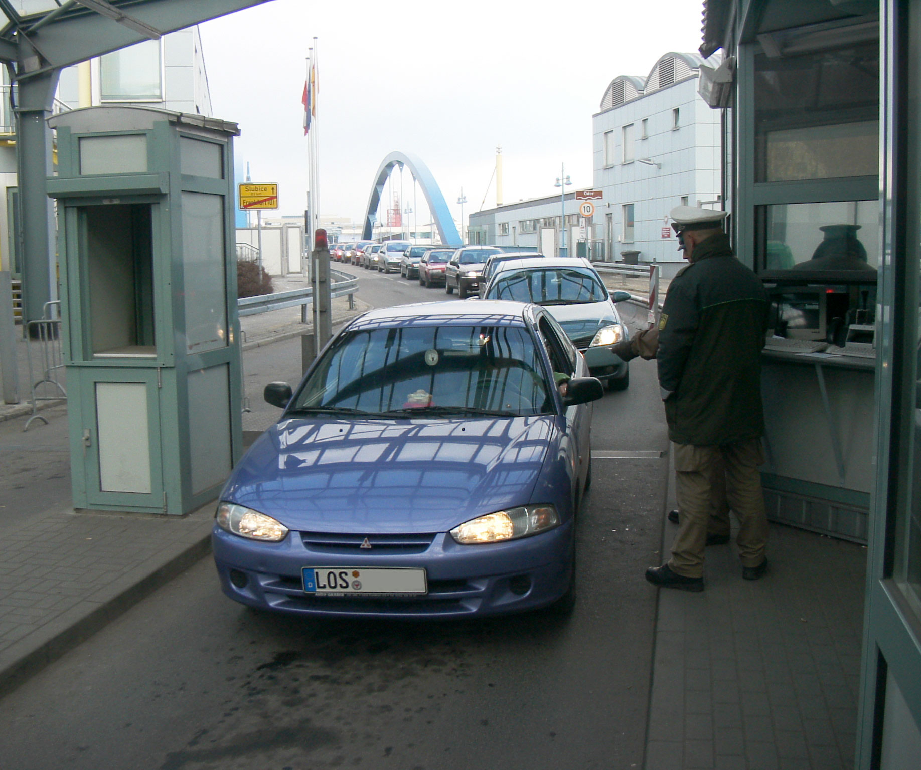 Passkontrolle durch die Bundespolizei und des polnischen Grenzschutzes an der Stadtbrücke Frankfurt/Oder